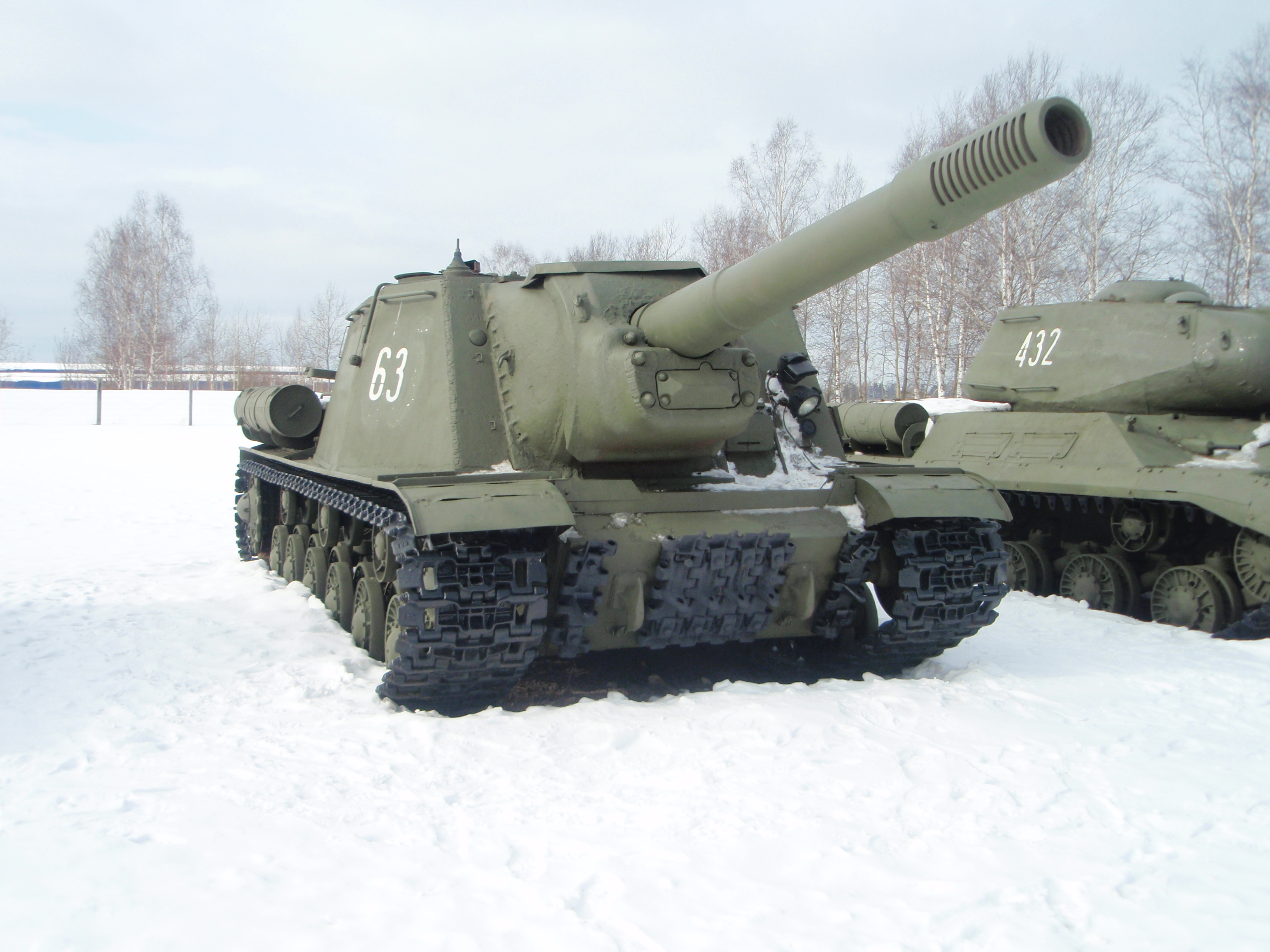 Советская самоходно-артиллерийская установка ИСУ-152 в Кубинке